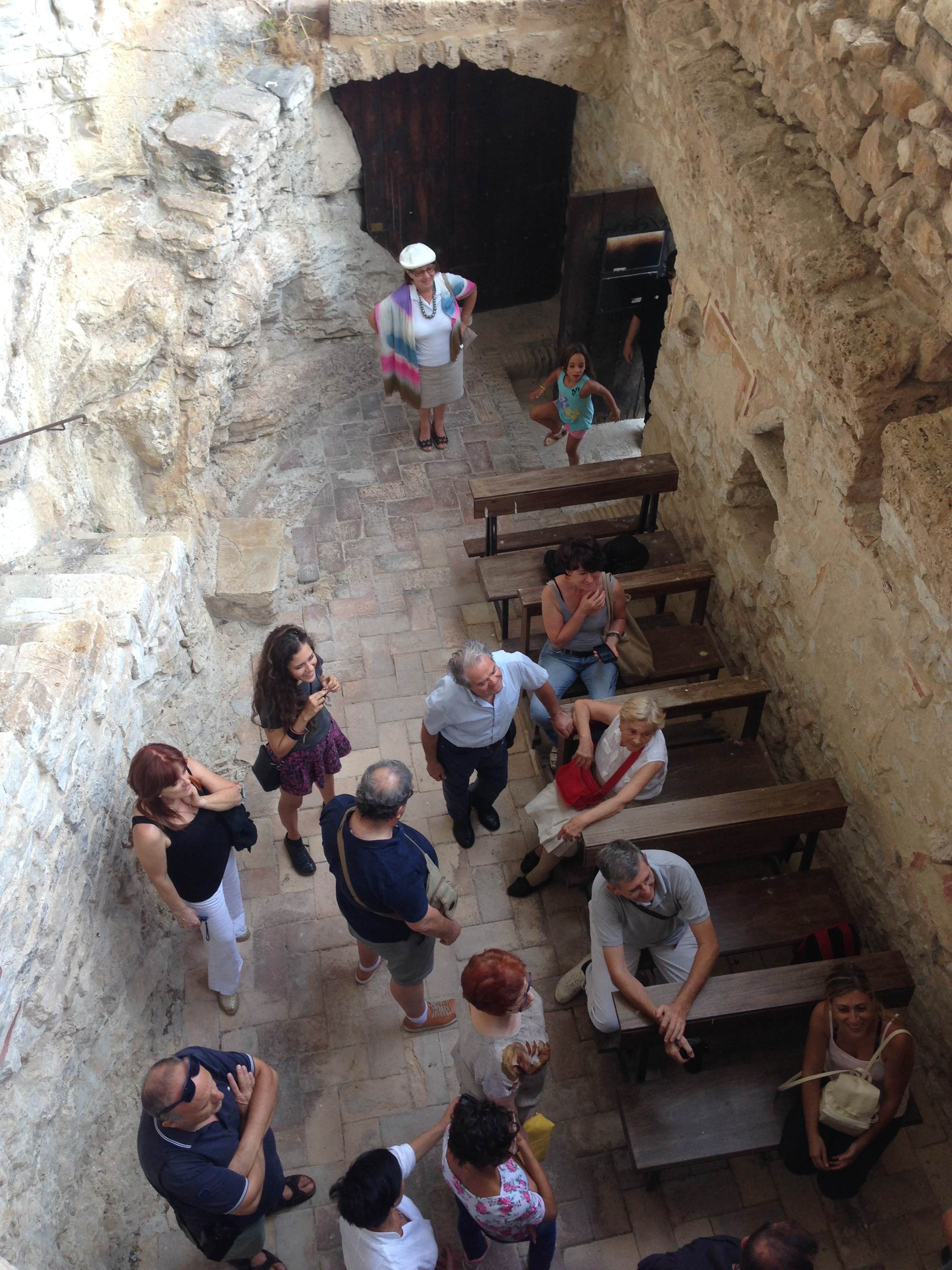 Eremo di San Cataldo. Cottanello. L'interno visto dal vano superiore.